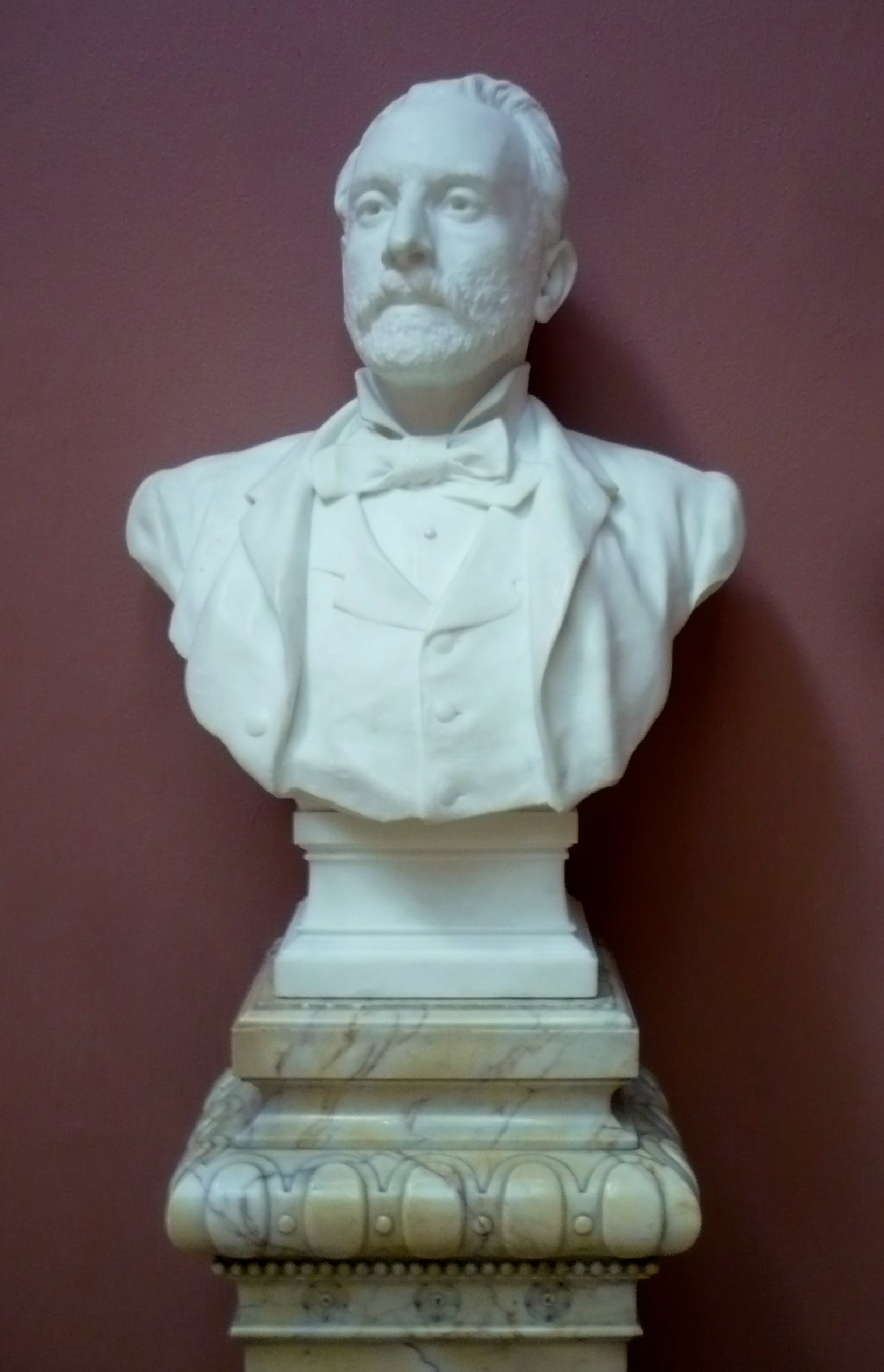 Pontus Fürstenberg, byst huggen i marmor 1884-85, av Per Hasselberg. Utställd i Fürstenbergska galleriet, Göteborgs Konstmuseum. (GKM F178)